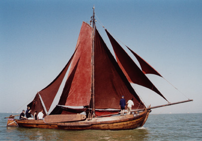 Op deze foto wordt de botter BU130 - Trui getoond met 8 zeilen. Het driehoekige zeil links op de foto is de aap. Informatie over Trui: [1]